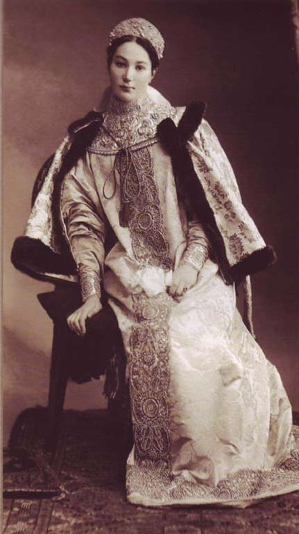 Графиня Александра Дмитриевна Толстая